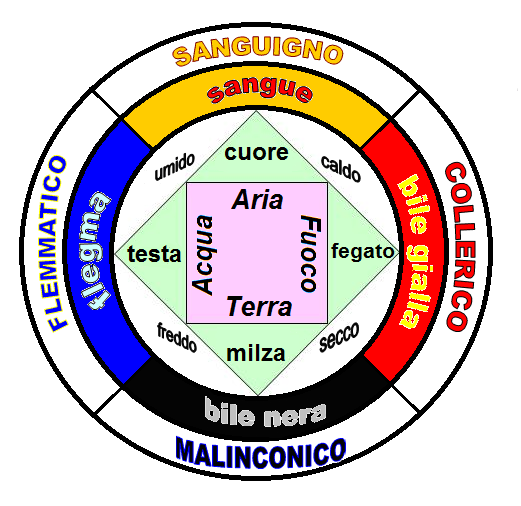 Schema dei quattro umori secondo la Scuola Medica Salernitana, suddivisi in base al loro elemento: aria, fuoco, terra, acqua.